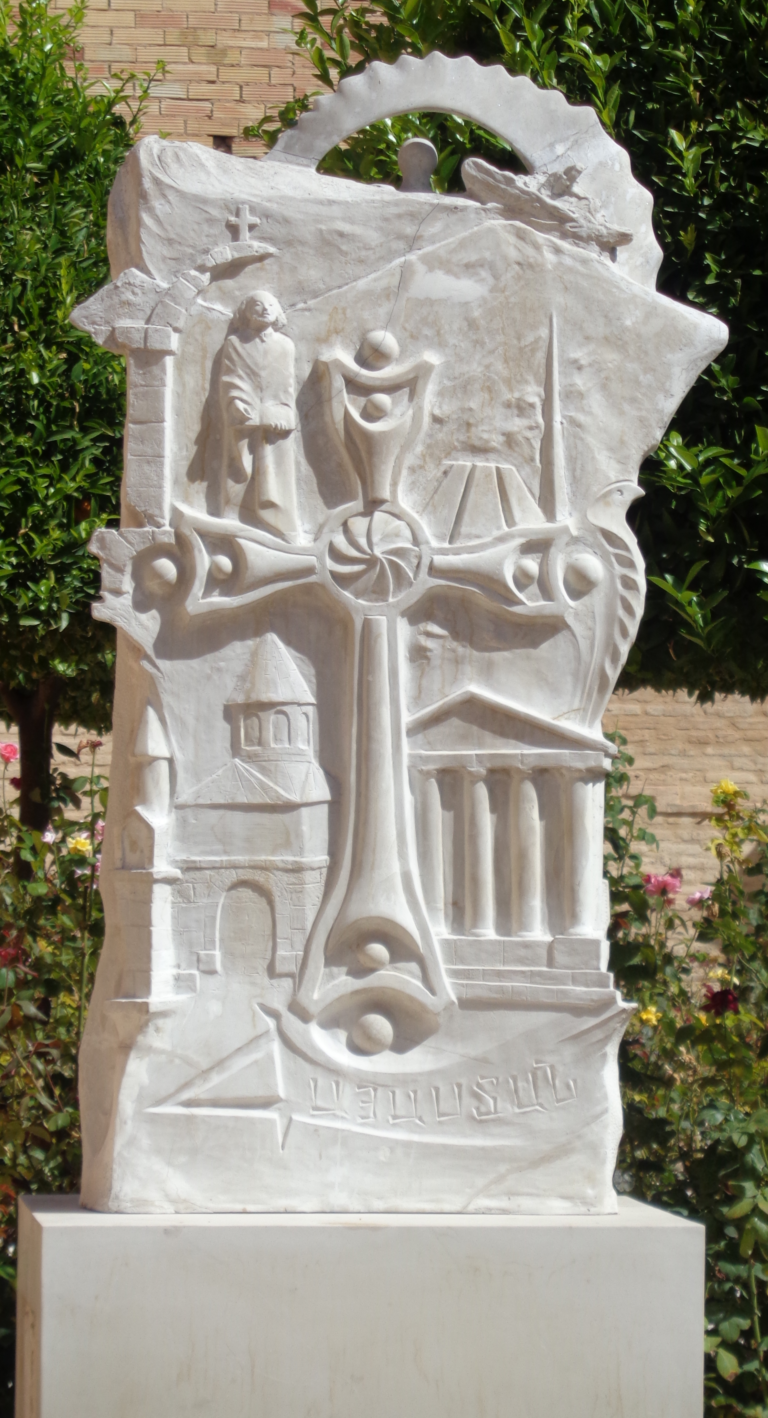 Mislata.